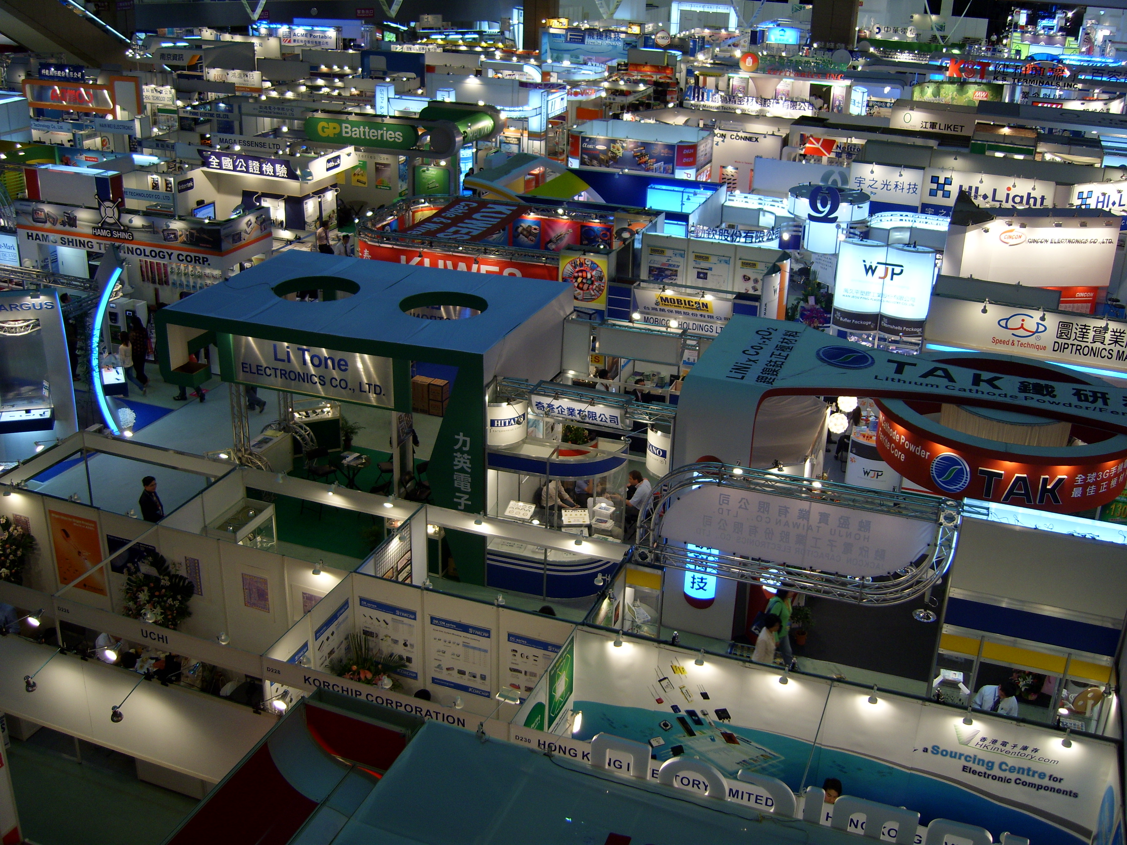 2007 TAITRONICS Autumn.